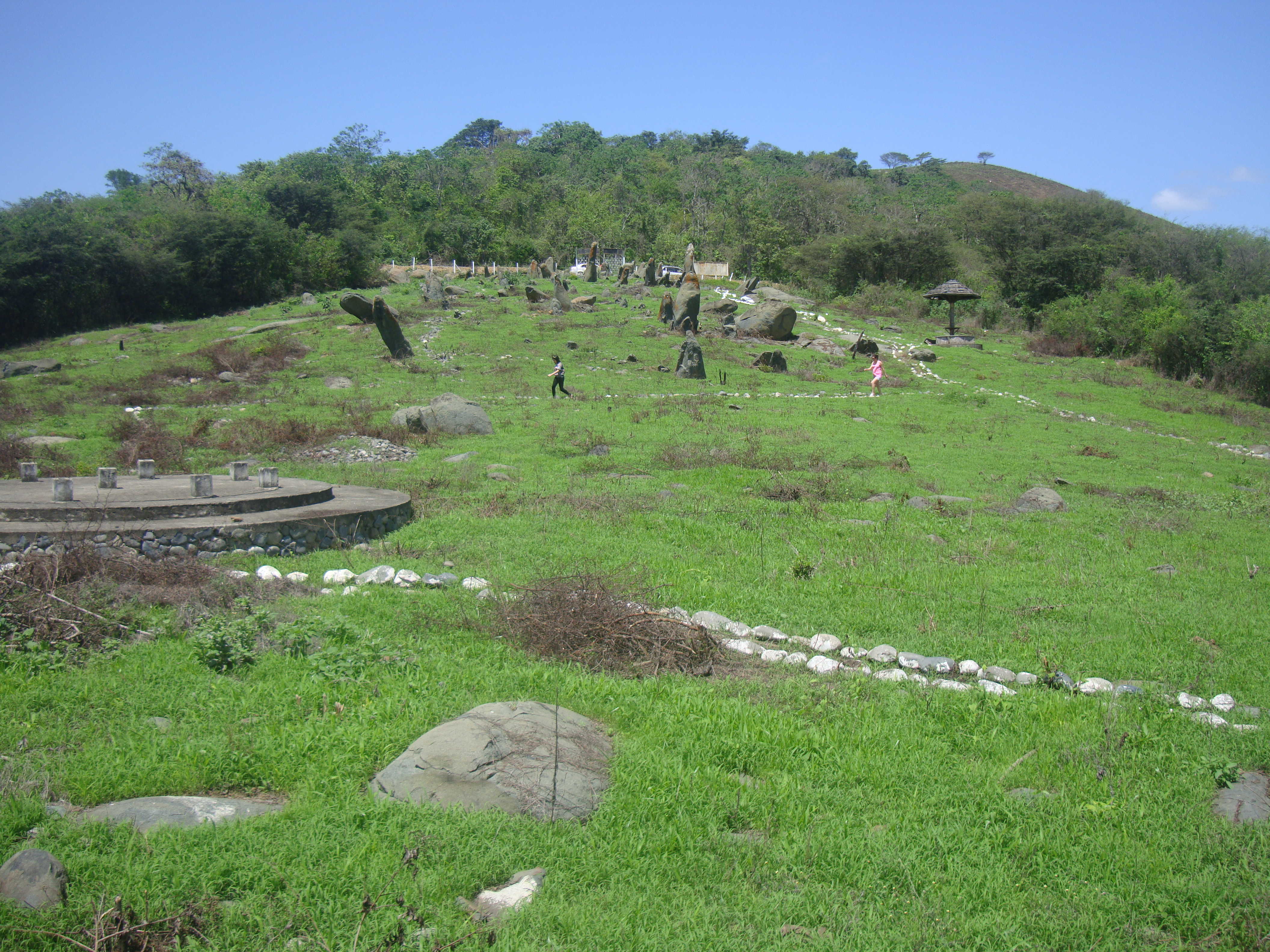 Quilluzara